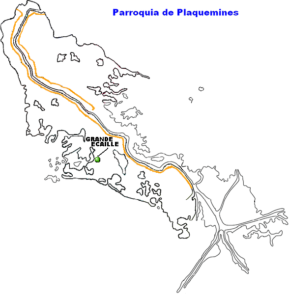 Grande Ecaille, Louisiana